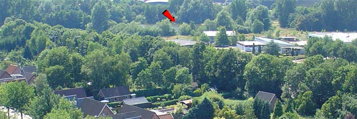 Ceresmeer nabij het Ceresdorp in Stadskanaal